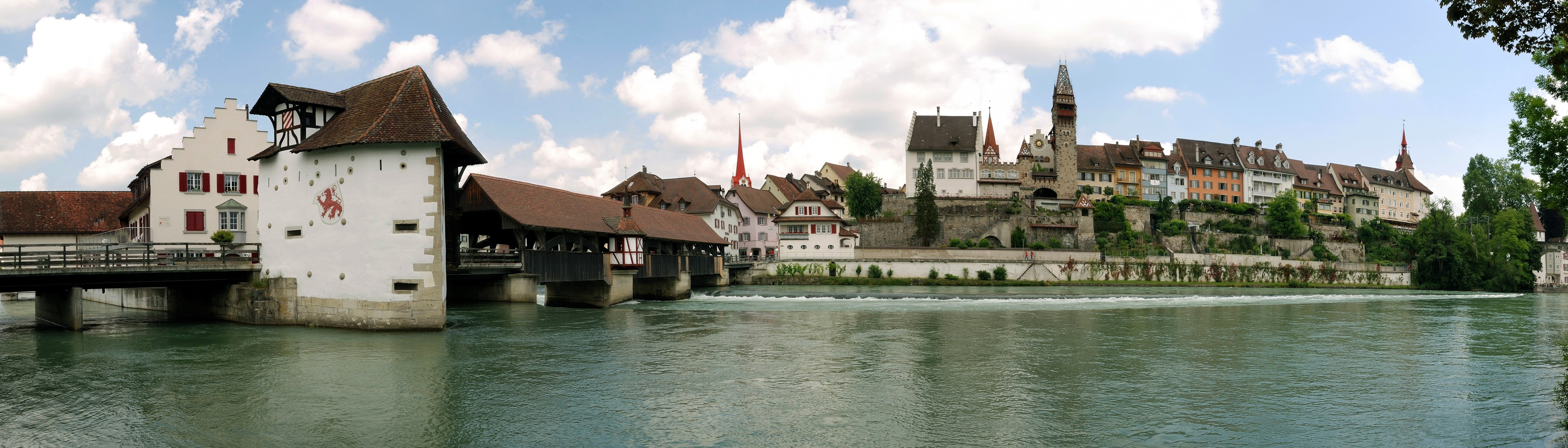 Ansicht von Bremgarten, von links nach rechts: Holzbrücke über die Reuss, Kirchturmspitze der Stadtkirche Bremgarten, Muri-Amthof, Spittelturm